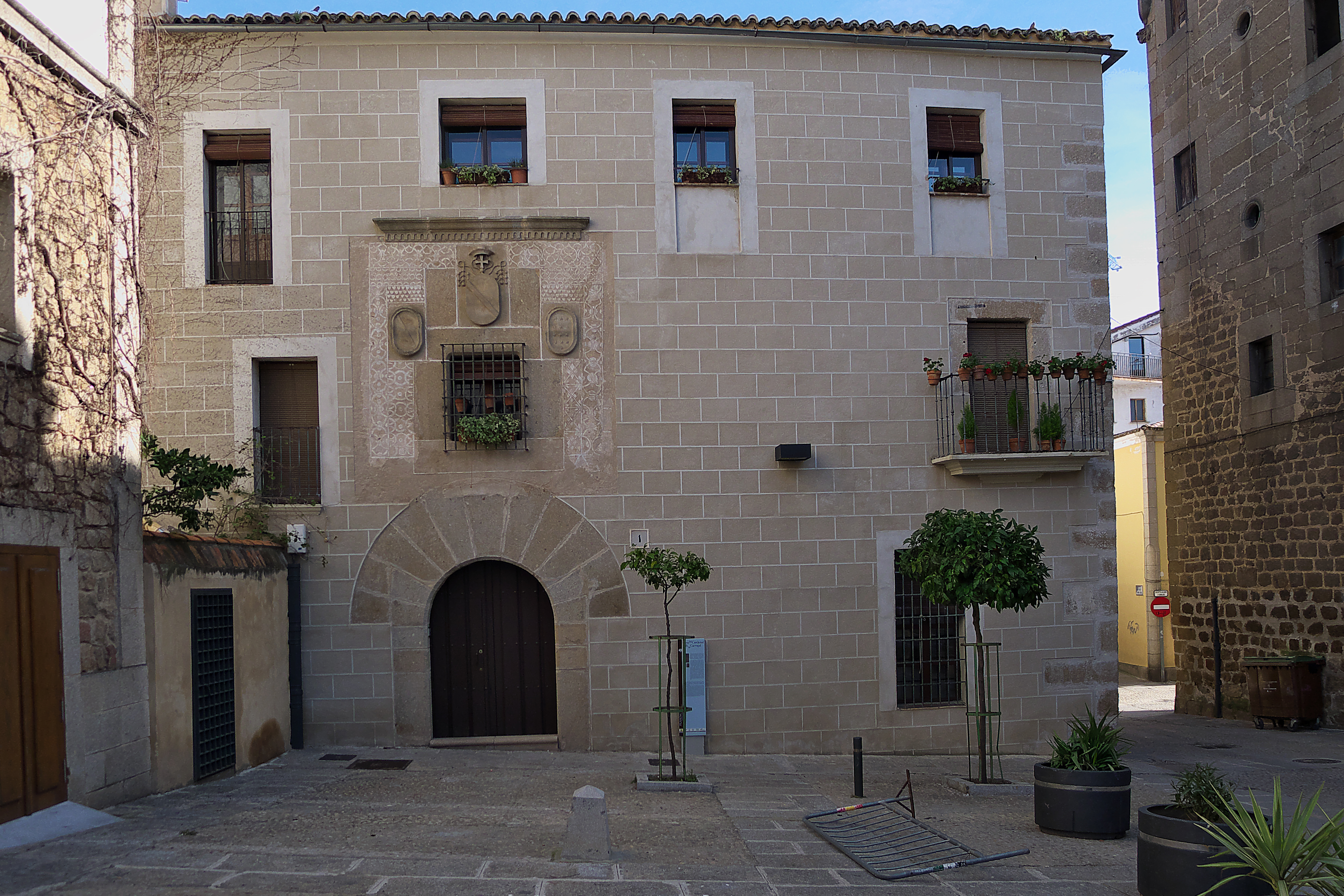 Vivienda del plasentino Bernardino López de Carvajal y Sande (†1523), obispo de Astorga, Badajoz y Sigüenza, cardenal de los Santos Marcelino y Pedro y cardenal de la Santa Cruz de Jerusalen.